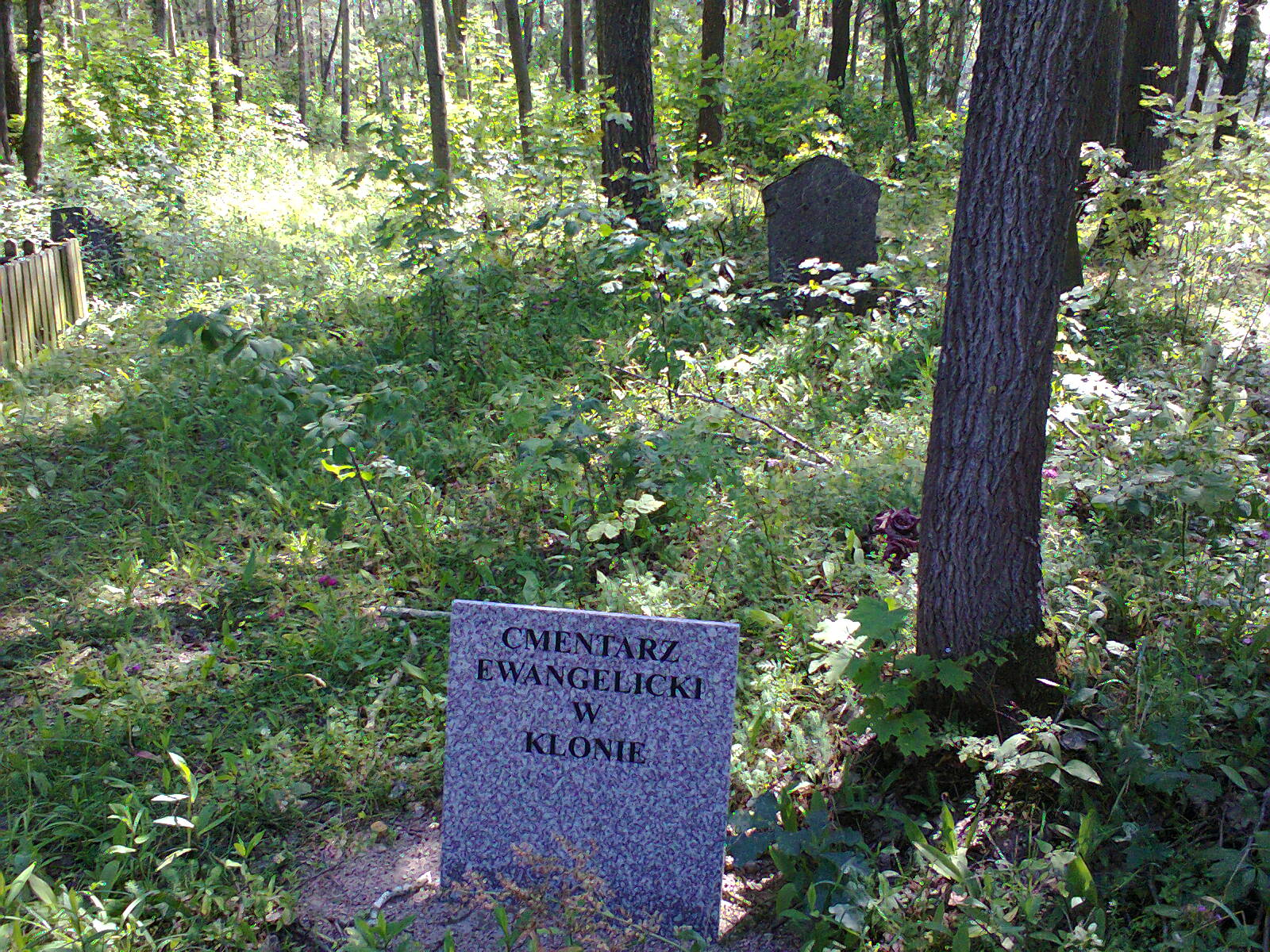 Klon - cmentarz ewangelicki (powiat szczycieński)